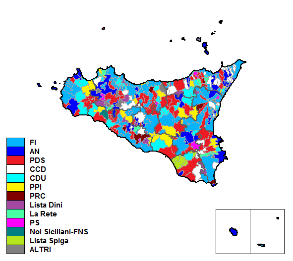 Partiti maggioritari nei singoli comuni nelle elezioni regionali siciliane del 1996.